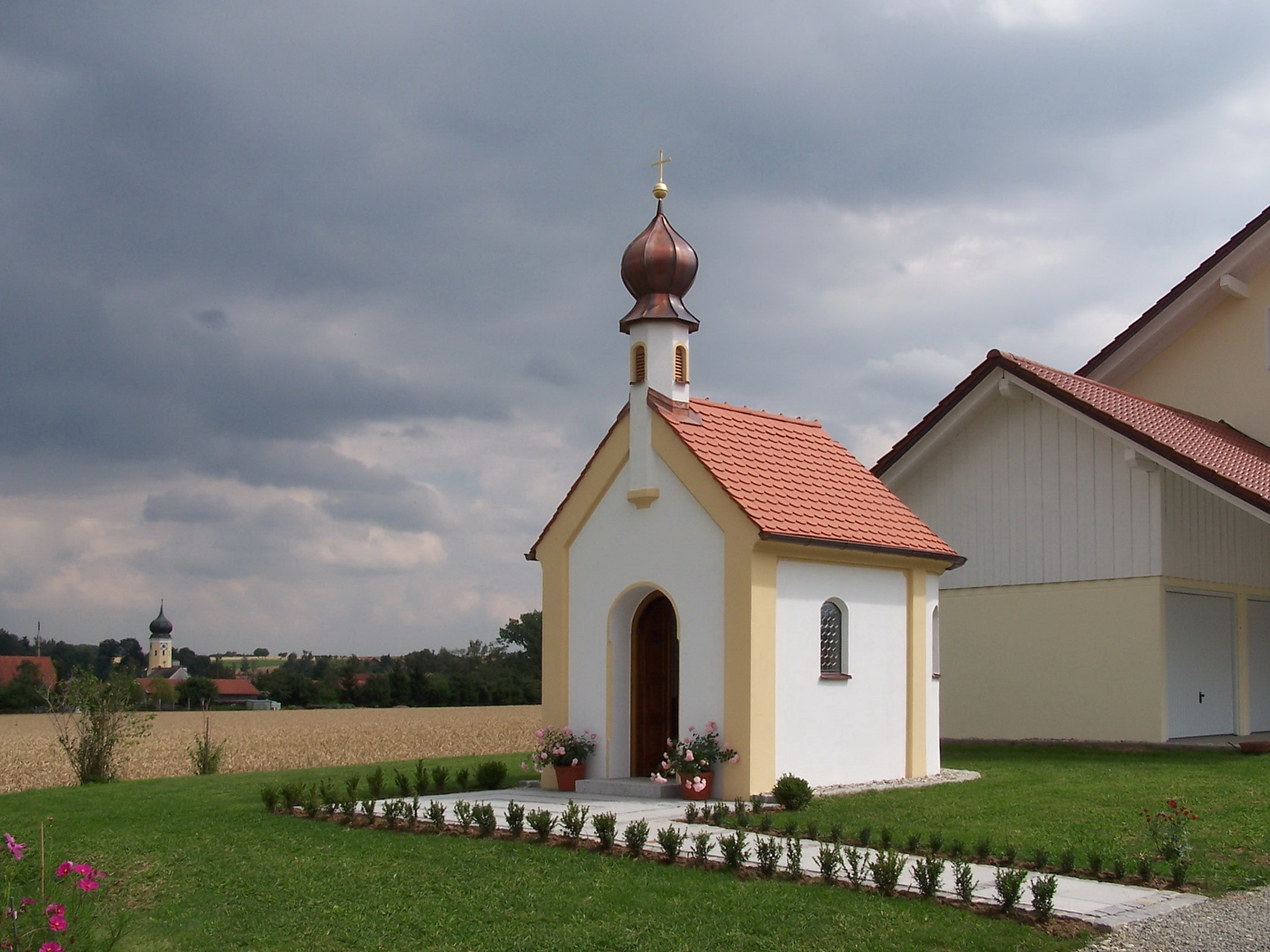 Geiselhöring, Hainsbach 7d, Spitzwegkapelle. In Sichtweite der Pfarrkirche wurde im Jahre 2005 von den Familien Spitzweg und Braun diese schöne Marienkapelle mit sehr viel Liebe zum Detail erbaut. Im achteckigen Dachreiter befindet sich eine kleine Glocke. Die Kapelle wurde im Juli 2005 von Pfarrer Betzner feierlich eingeweiht.